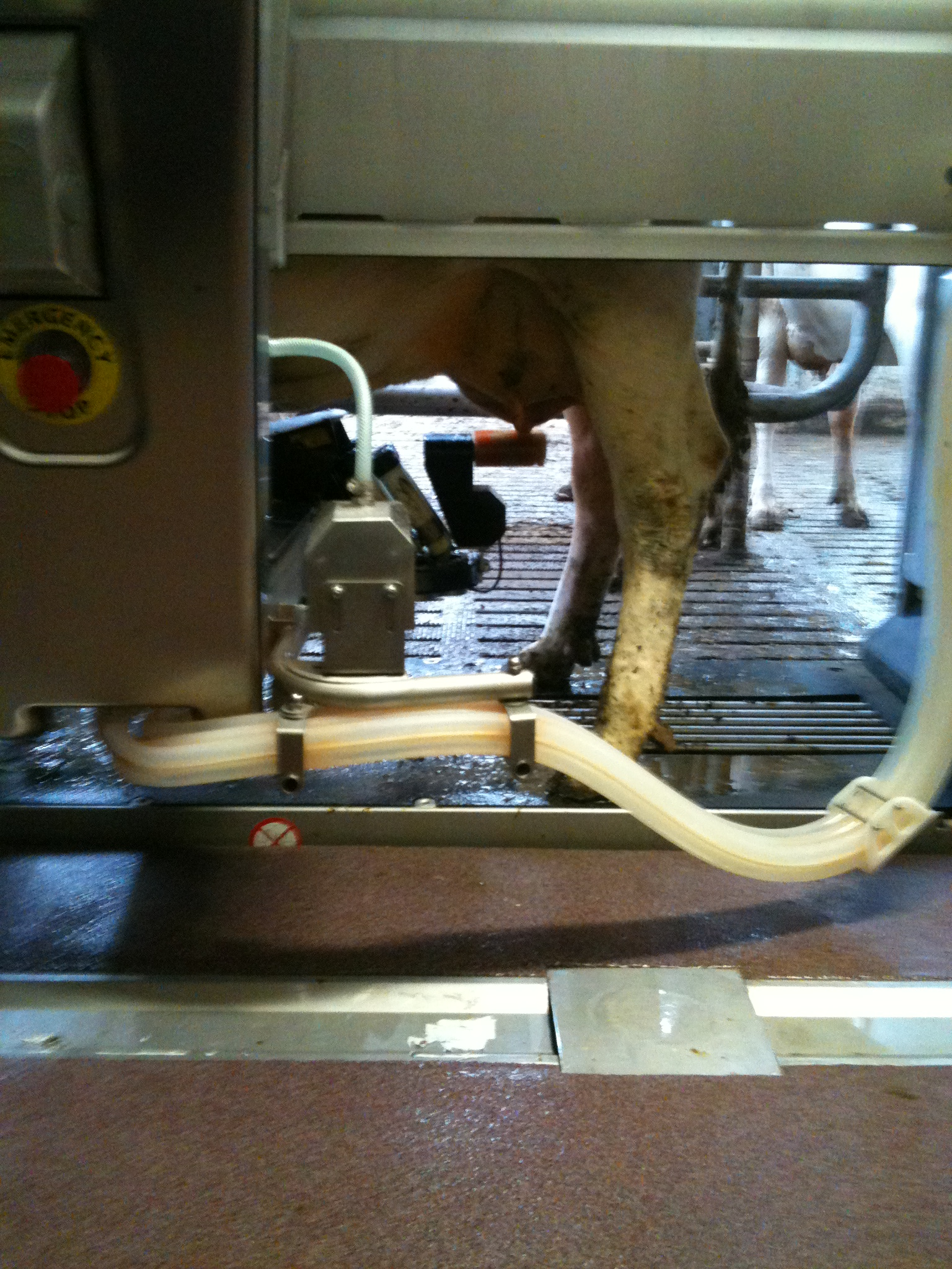 Melkroboter bei der Vorreinigung mit rotierenden Bürsten